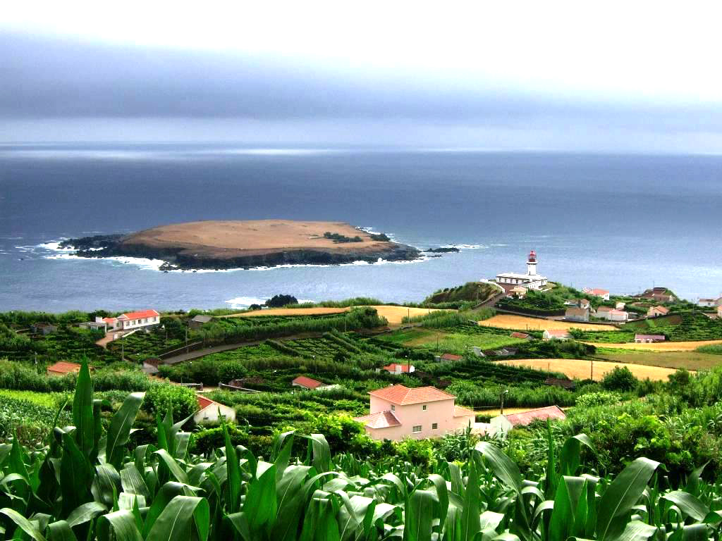 Ilheu do Topo, Topo, ilha de São Jorge, Açores, Portugal